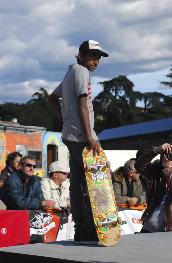 Skateboarder, Festival della Creatività 2009, Florence, Italy.